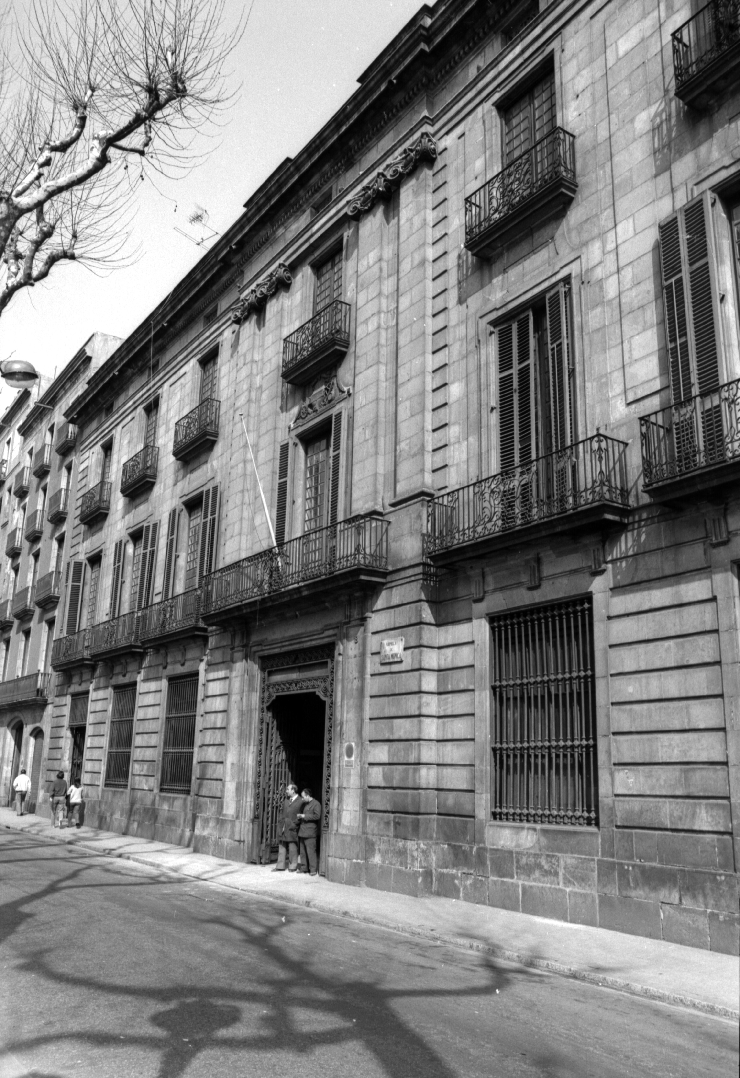 El palau Marc de Reus de la Rambla de Barcelona. Obre de Joan Soler Faneca. Fot. de l'any 1982.